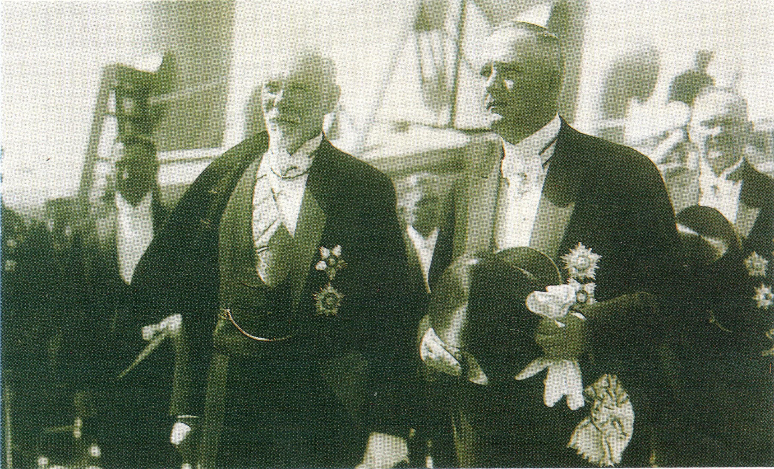 Latvian presidentti Jānis Čakste ja Latviassa valtiovierailulla oleva Suomen presidentti Lauri Kristian Relander. Taustalla oikealla Suomen ulkoministeri E. N. Setälä.